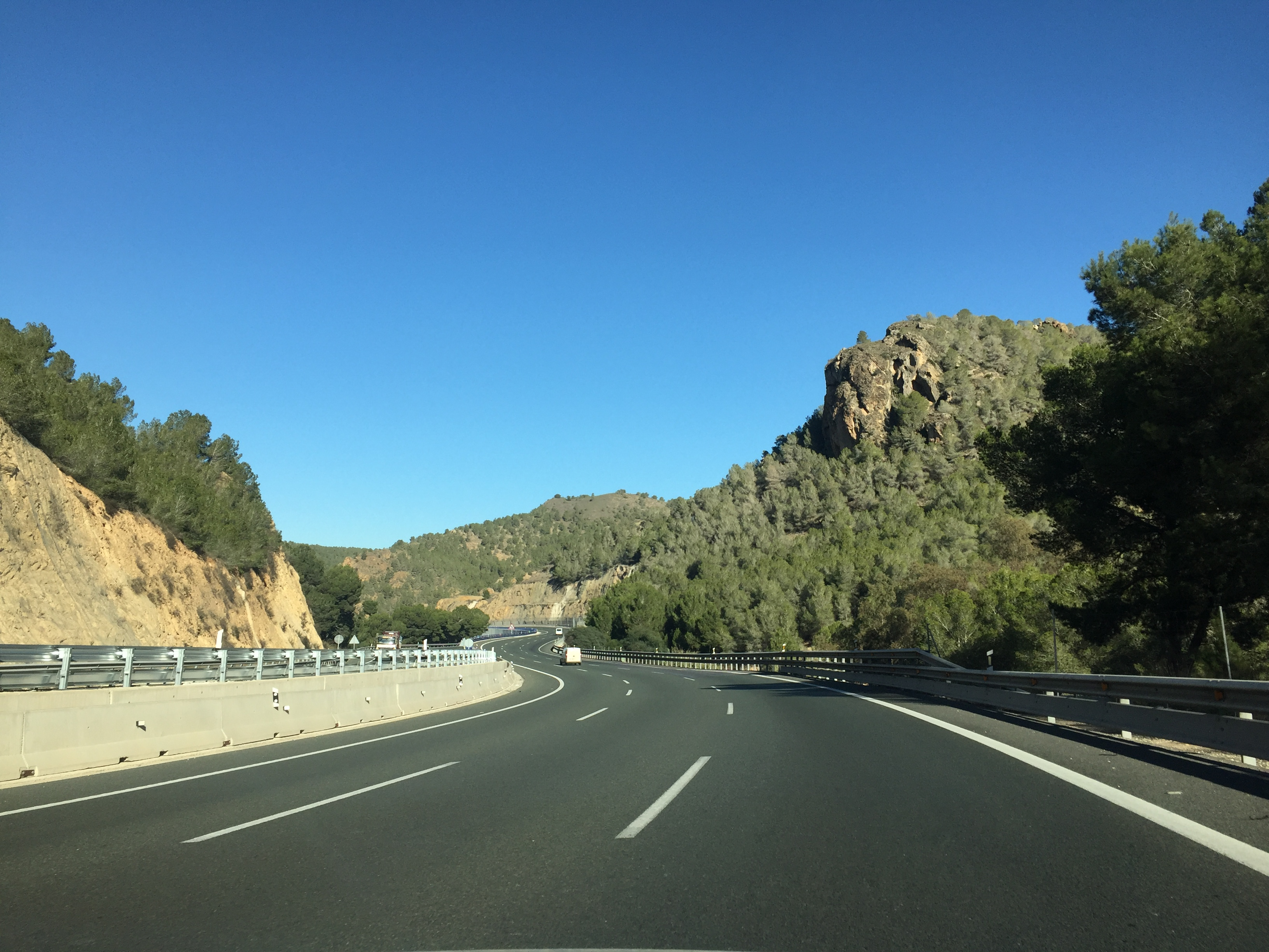 Motorvägen A30 nära Murcia